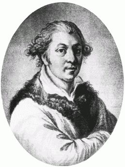 актер Сандунов, Сила Николаевич (1756—1820)